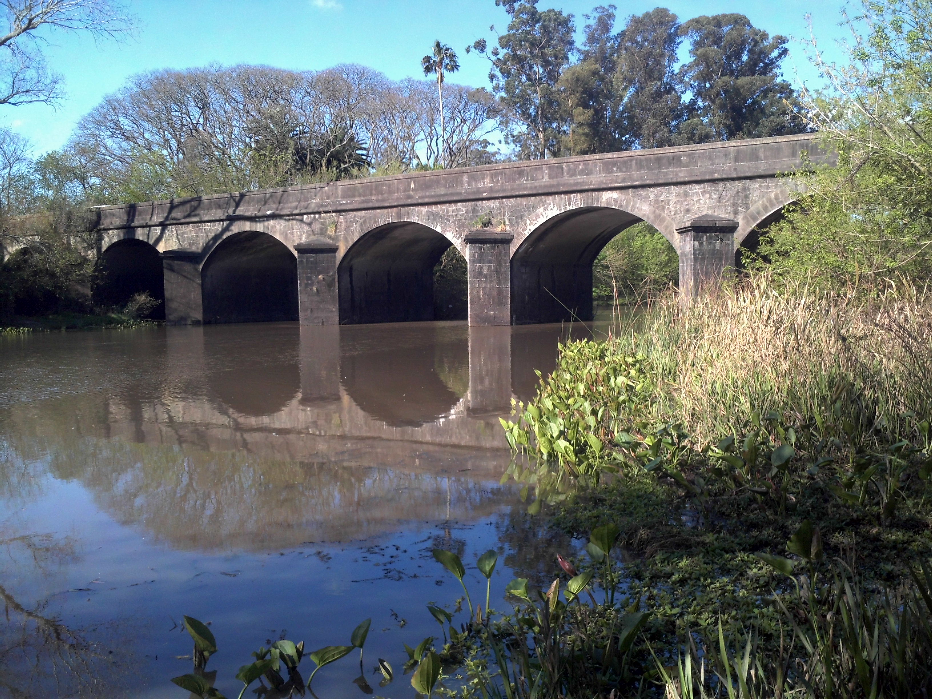 Construido sobre el Arroyo Pando (Uruguay ) declarado patrimonio histórico nacional